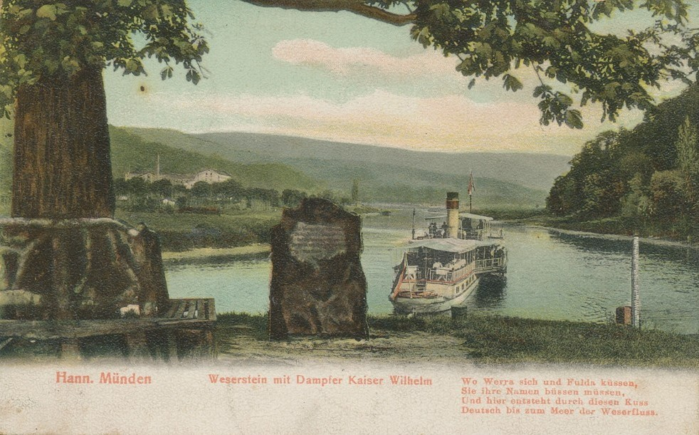 Der Weserstein bei Hanoversch Münden